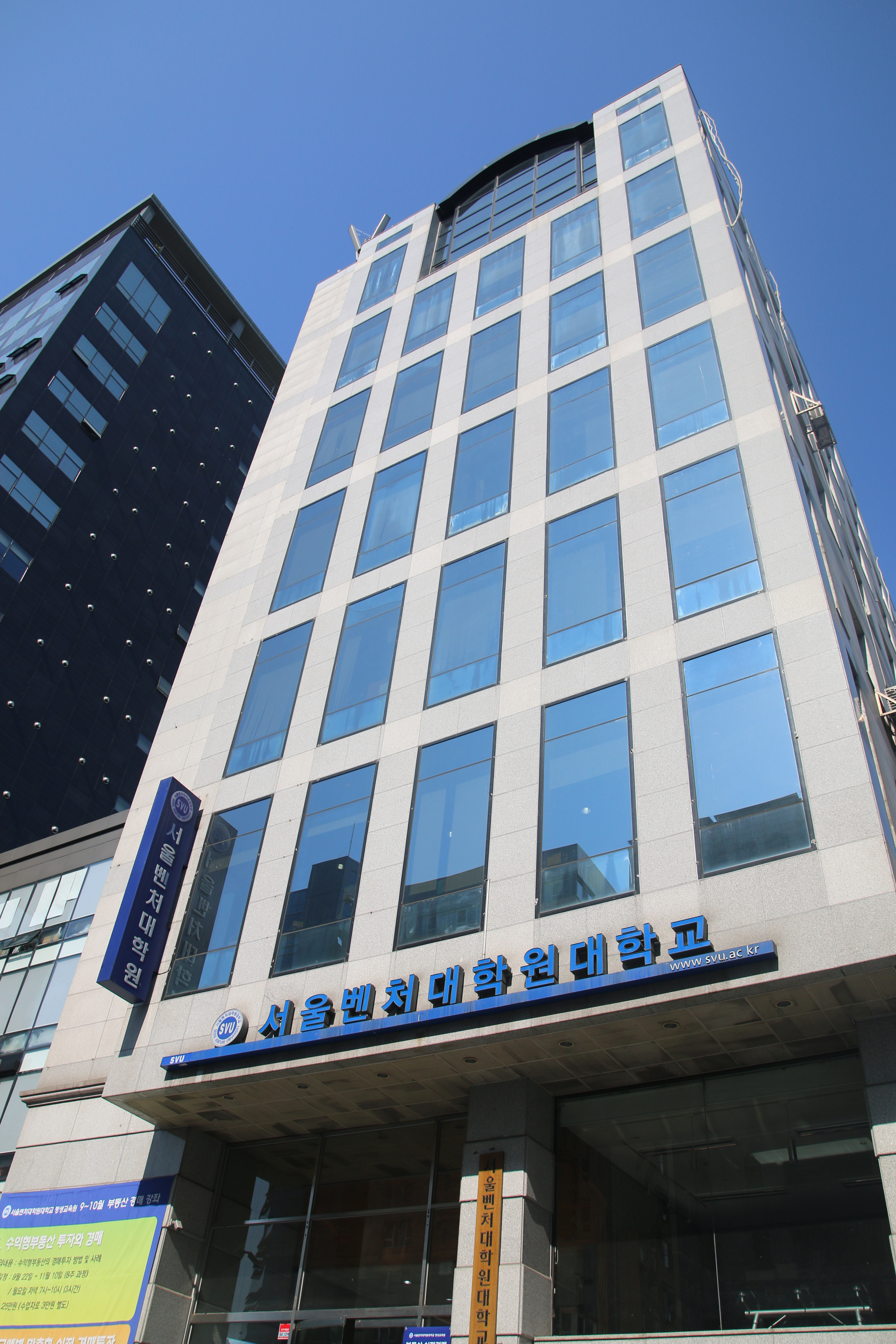 조선말: 서울벤처대학원대학교 학교 외관